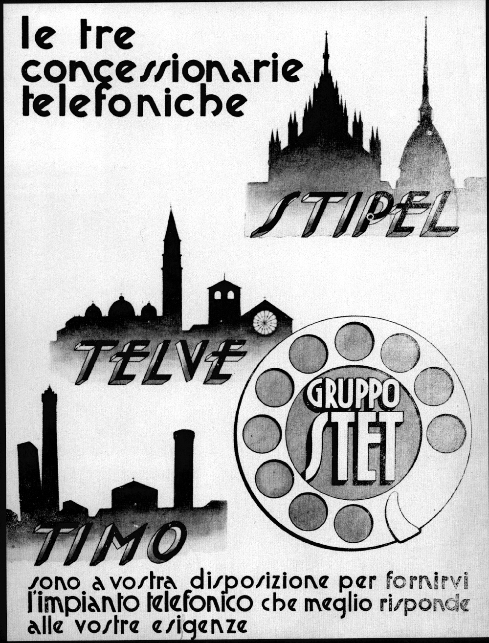 Manifesto pubblicitario Gruppo STET, Società Torinese Esercizi Telefonici, anni ’30. Foto Archivio Storico TIM